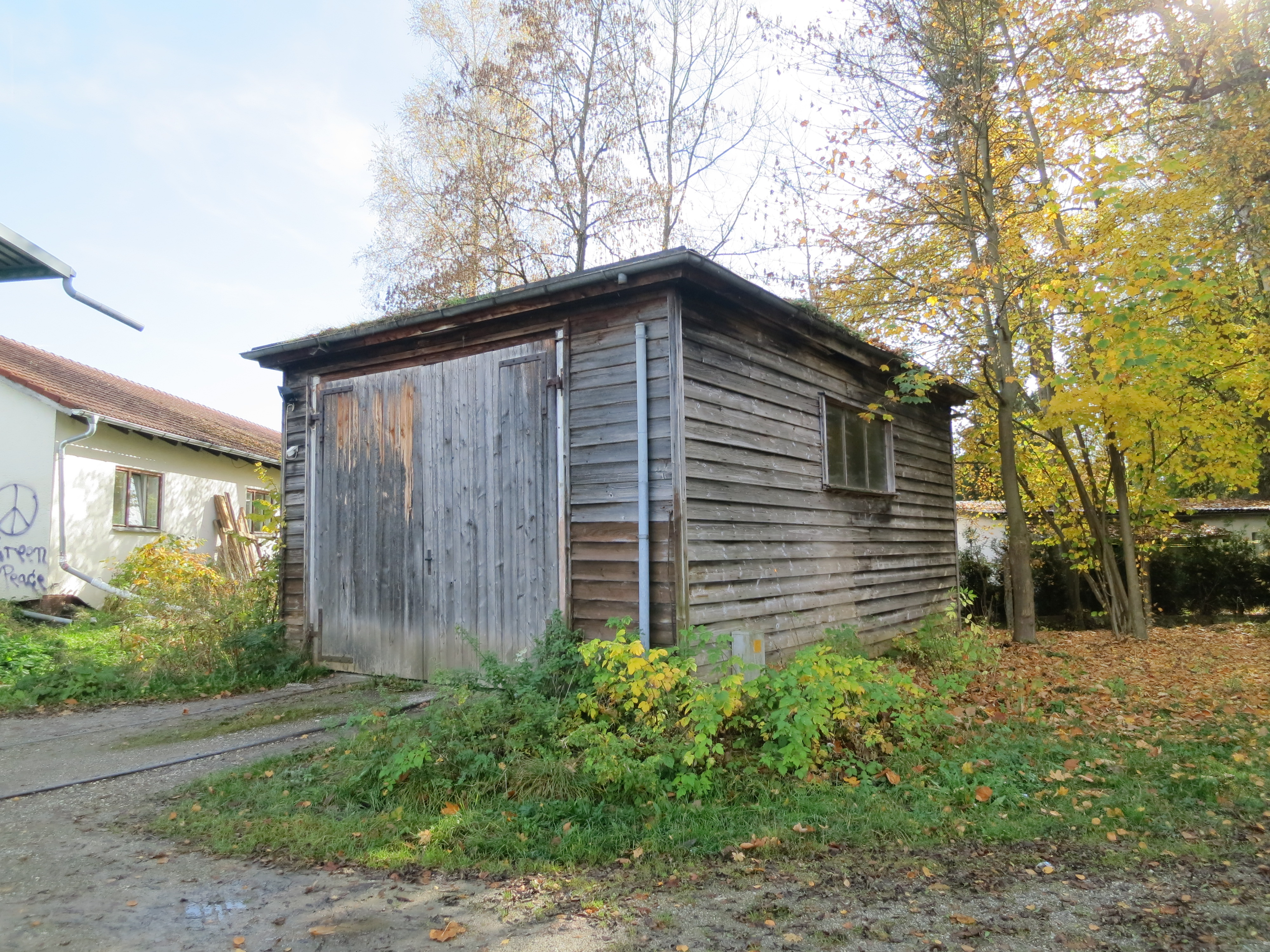 Ehemaliger Kleinlokschuppen des Bahnhofs Dießen an der Ammerseebahn mit Gleisresten